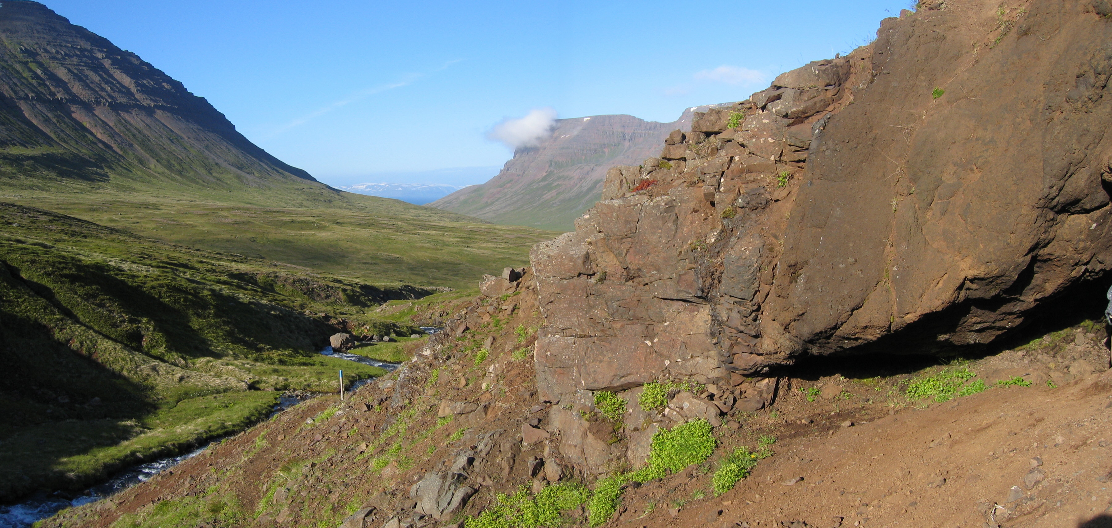 Surtarbrandsnáma, Syðridalur Bolungarvík Inngangur í námuna Salvör Gissurardóttir July 2006